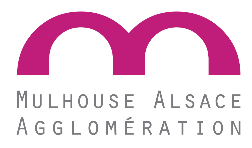 Logo officiel de Mulhouse Alsace Agglomération